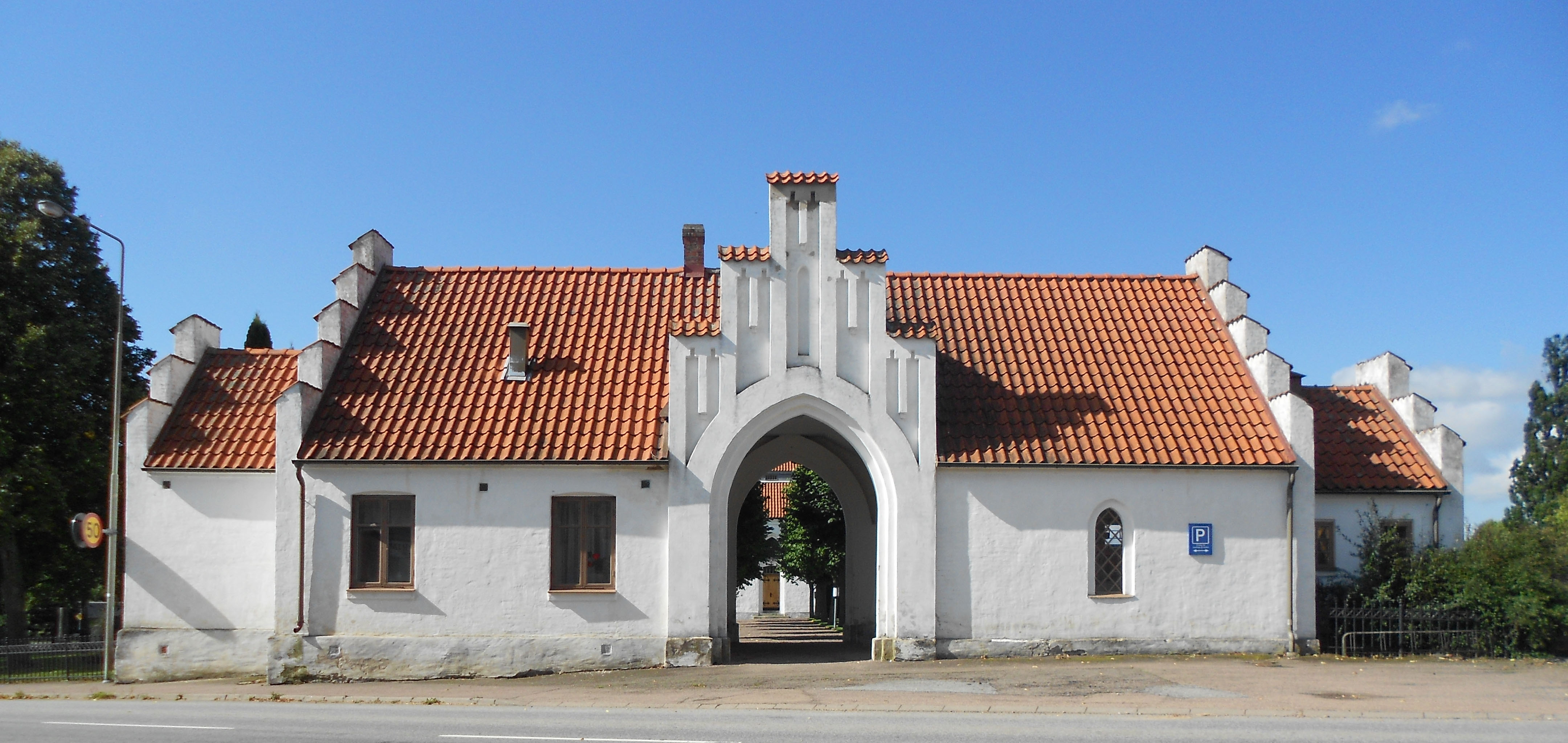 Billeberga kyrka.